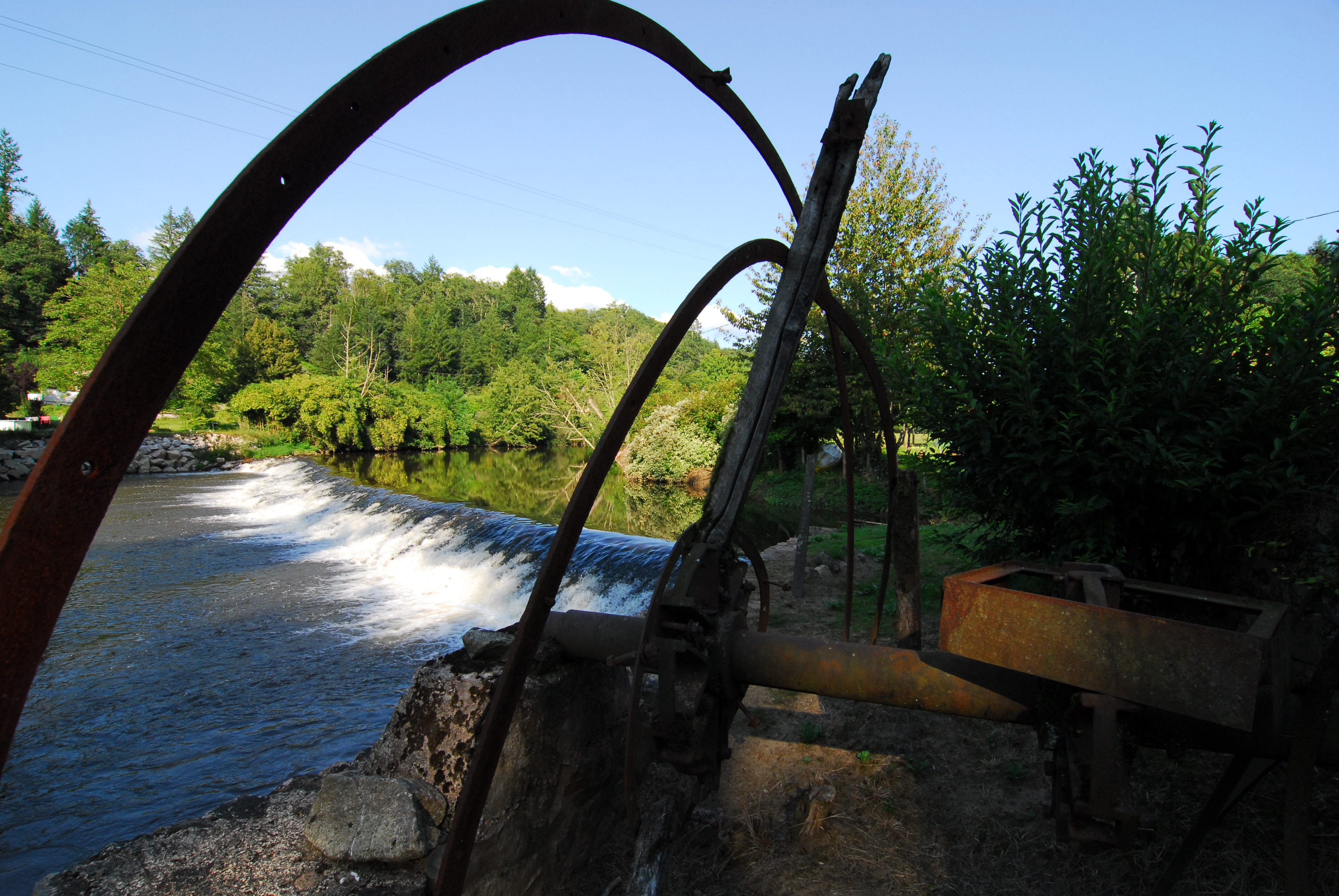 Birance au moulin de saint paul